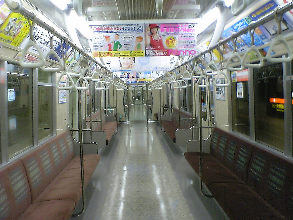 東西線8000形2006年度導入車の車内の様子